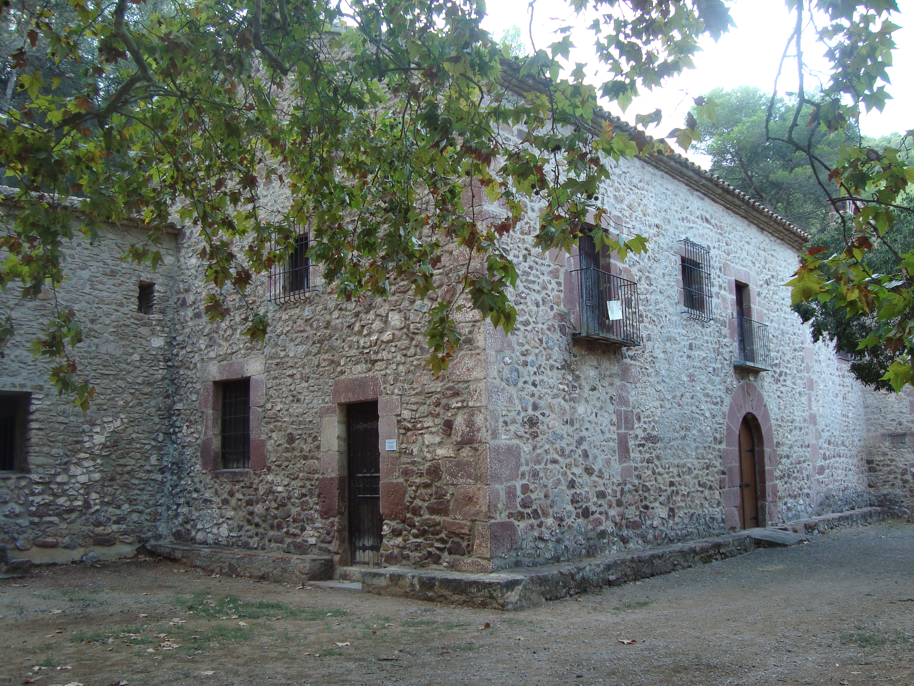 Ermitori de Santa Águeda i Santa Llúcia